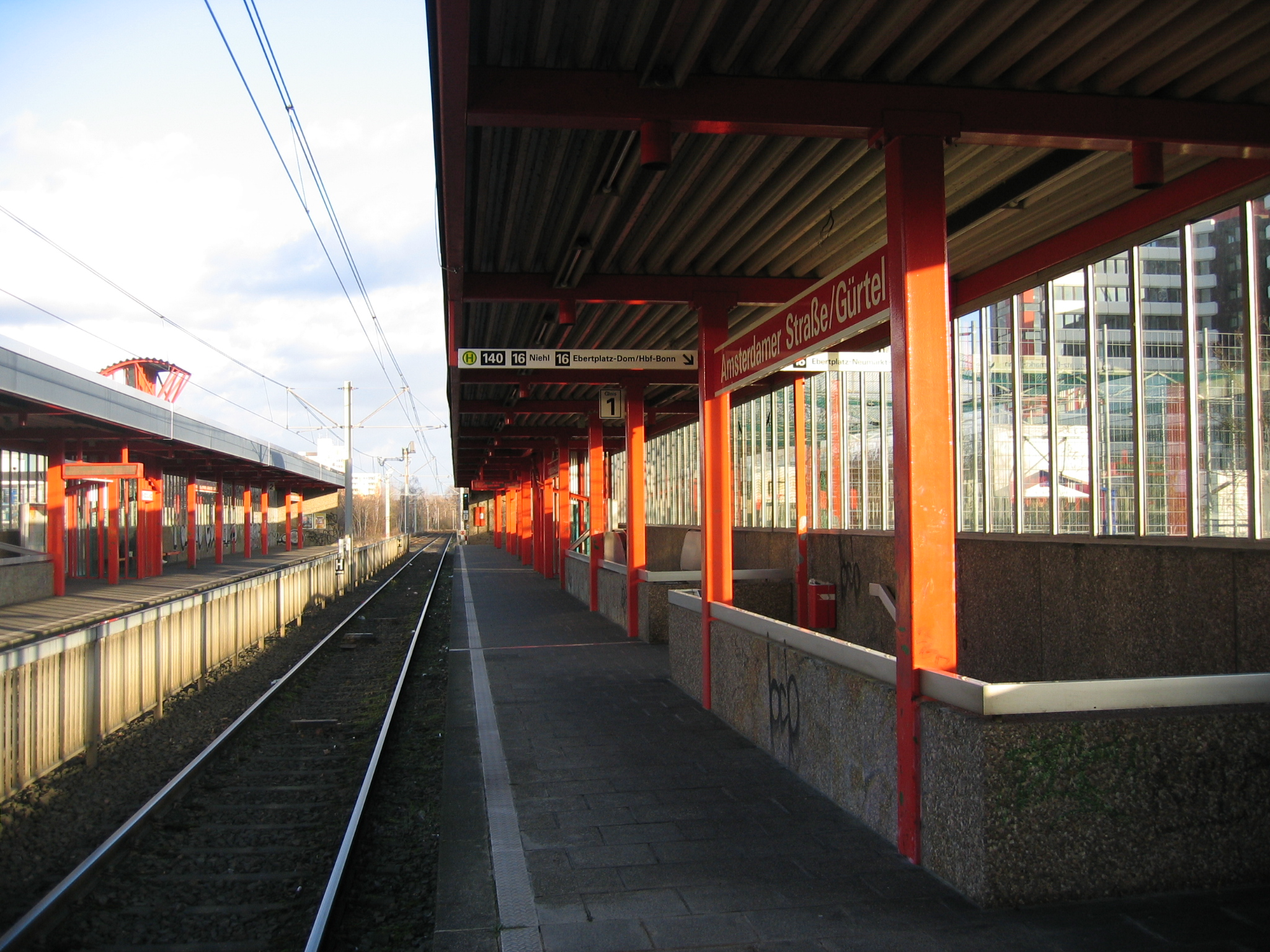 U-Bahn-Station Amsterdamer Str./Gürtel der Stadtbahn Köln